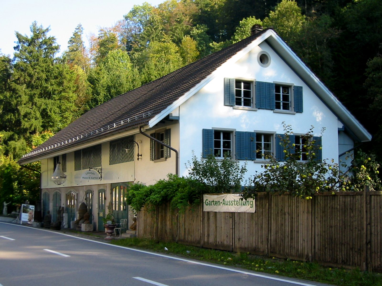 Nähmaschinen-Museum am Pilgersteg in Dürnten, Aussenansicht